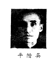 中文（台灣）: 制憲國民大會代表吳階平